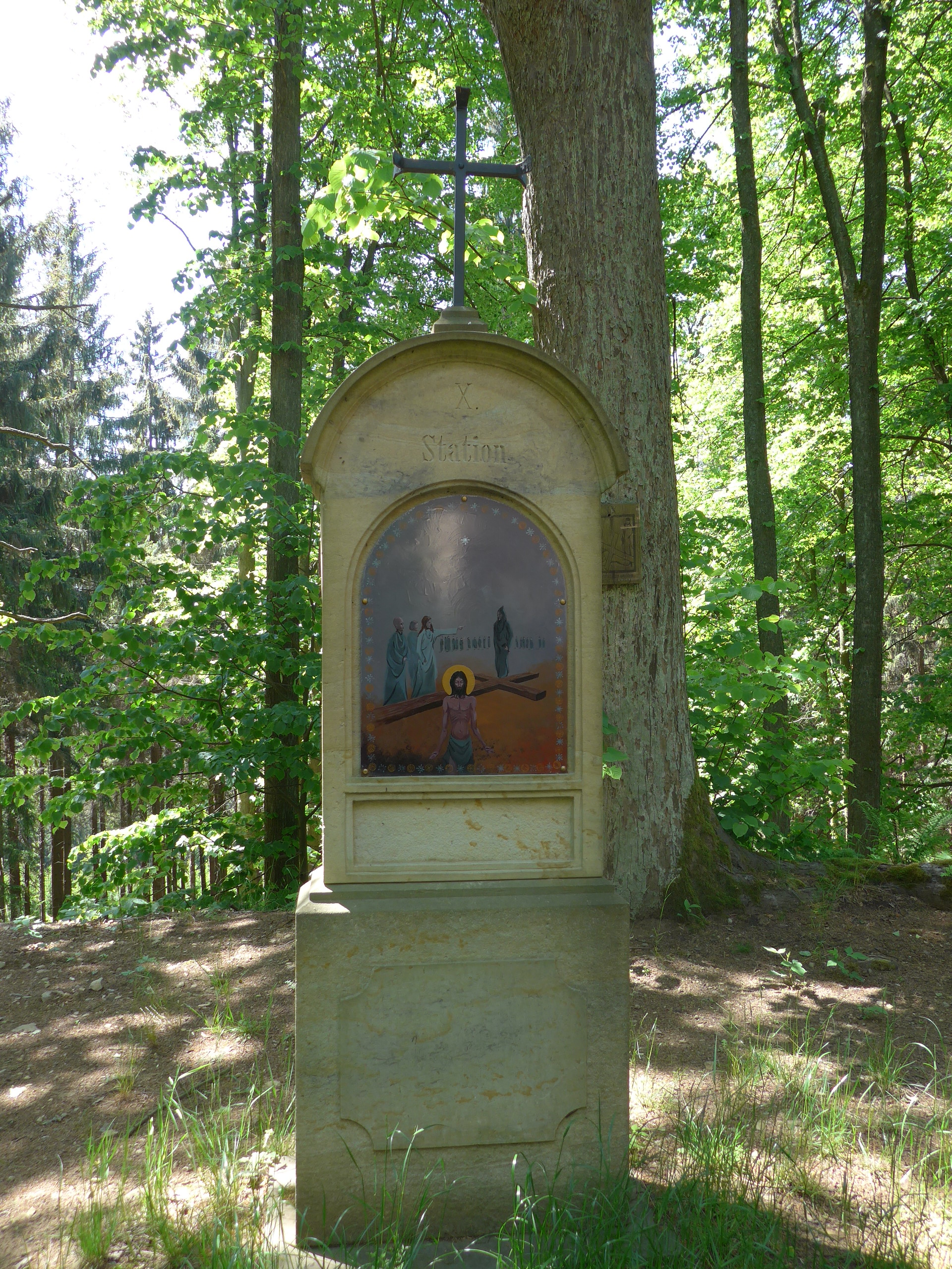 Zrekonstruovaná křížová cesta na vrchu Jáchym u Lobendavy